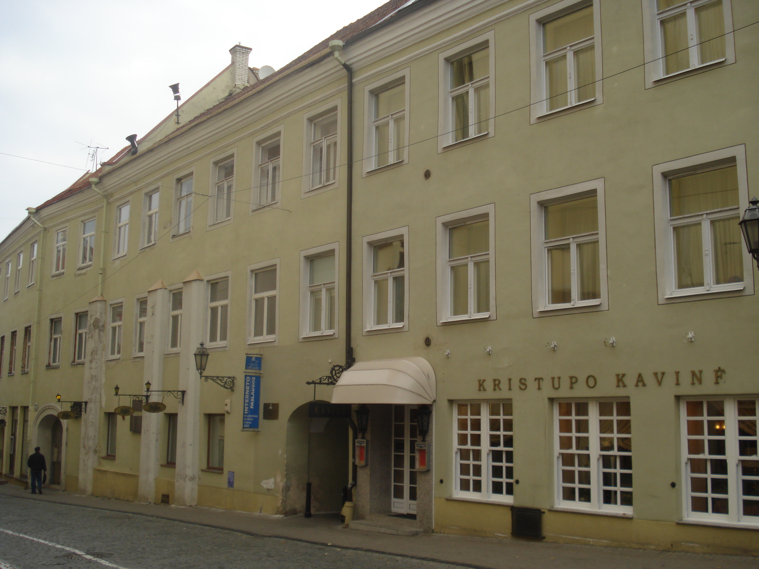 Collegium Medicum in Pilies street in Vilnius (Pilies g. 22)